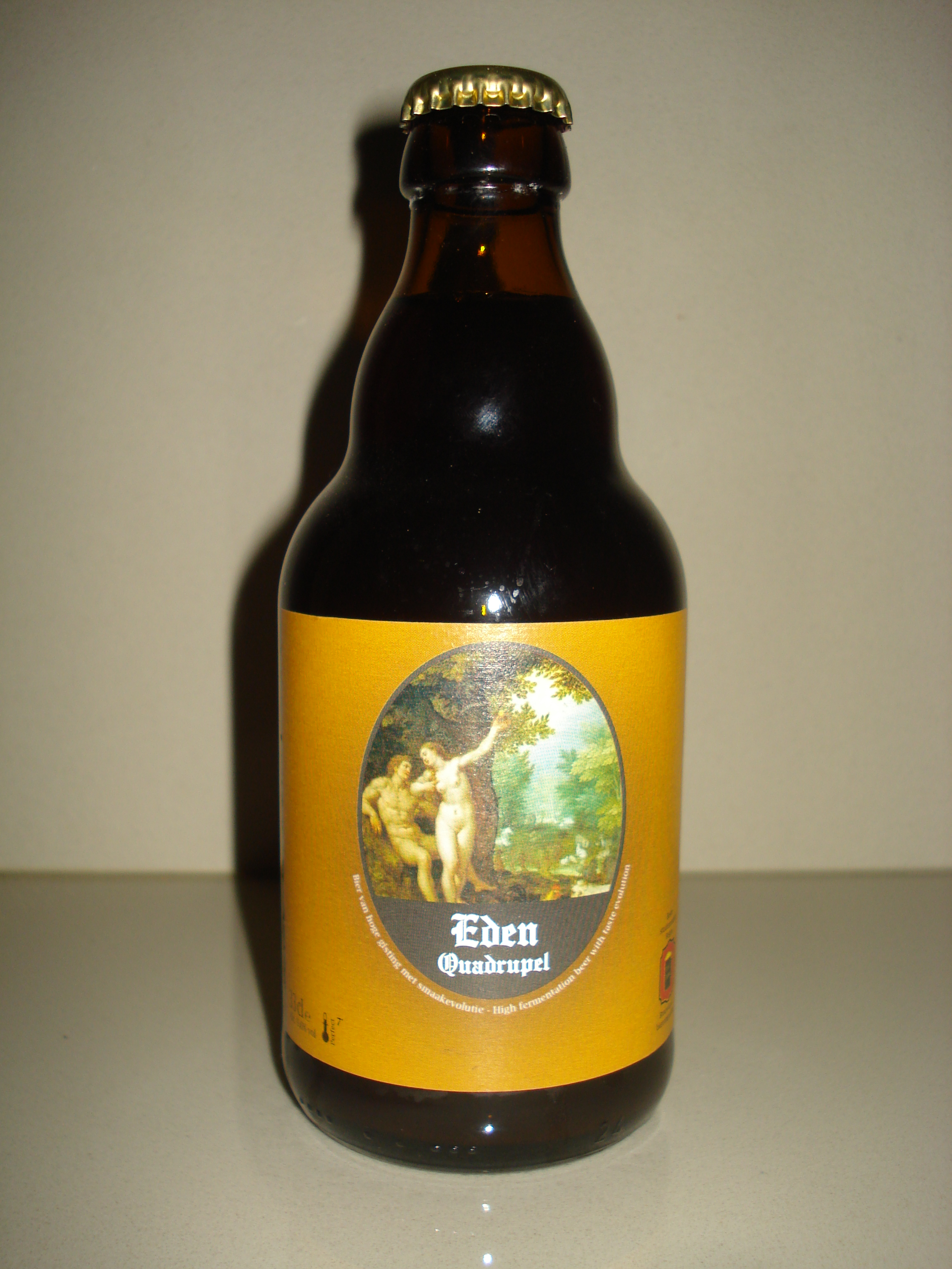 Eden Quadrupel